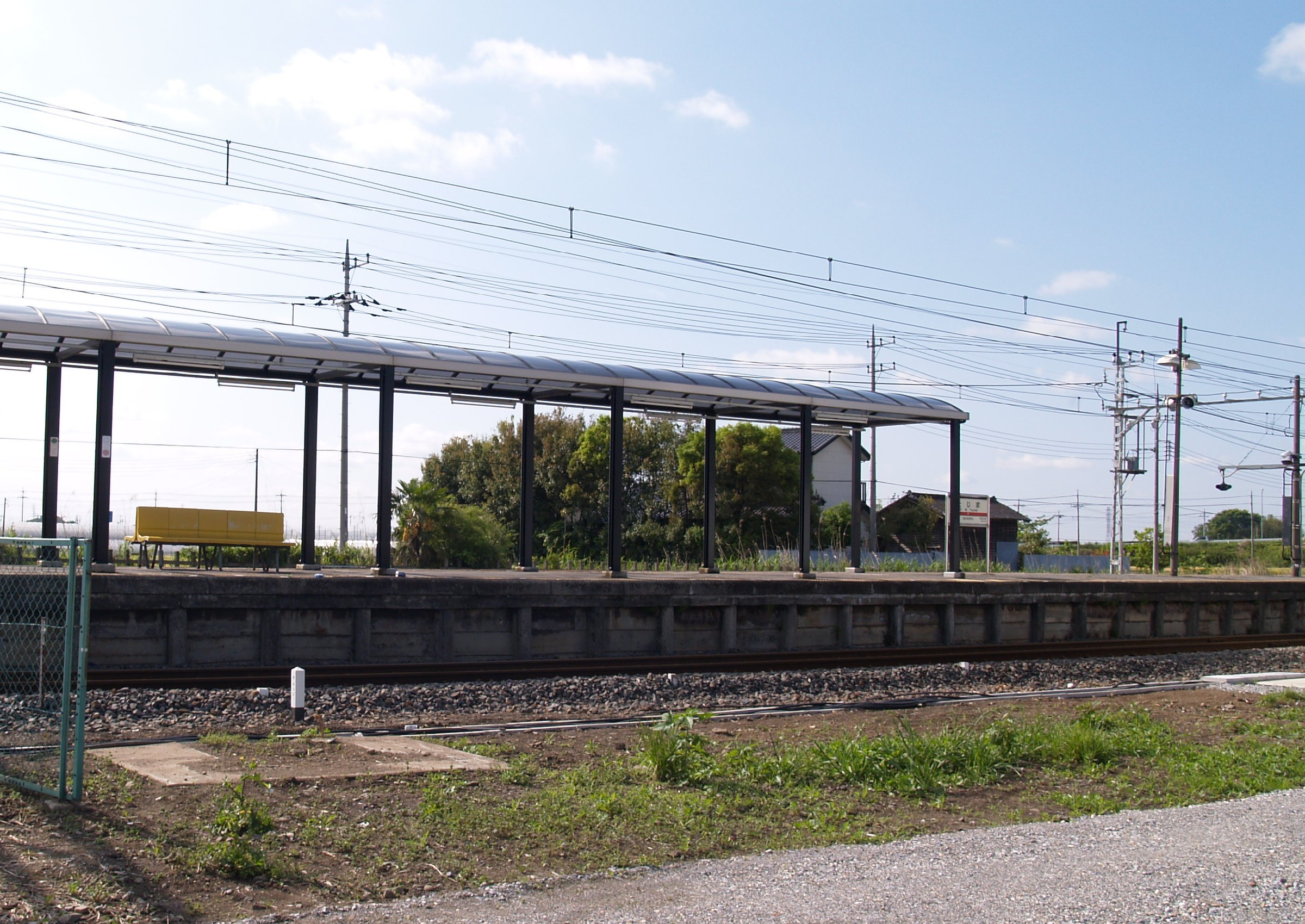 田島駅ホーム